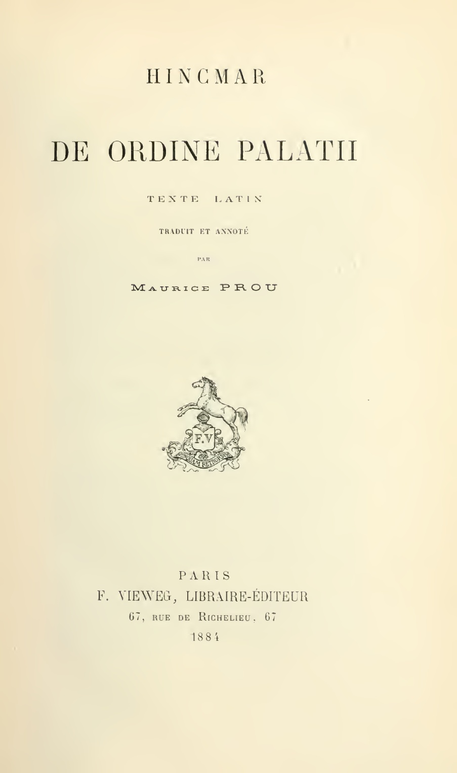 Hincmar de Reims, De Ordine Palatii, éd. par Maurice Prou, Bibliothèque de l’Ecole des Hautes Etudes 58, Paris, Vieweg, 1885